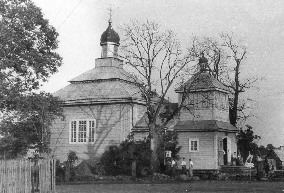 Беларуская (тарашкевіца): Новы Двор (Novy Dvor). Царква